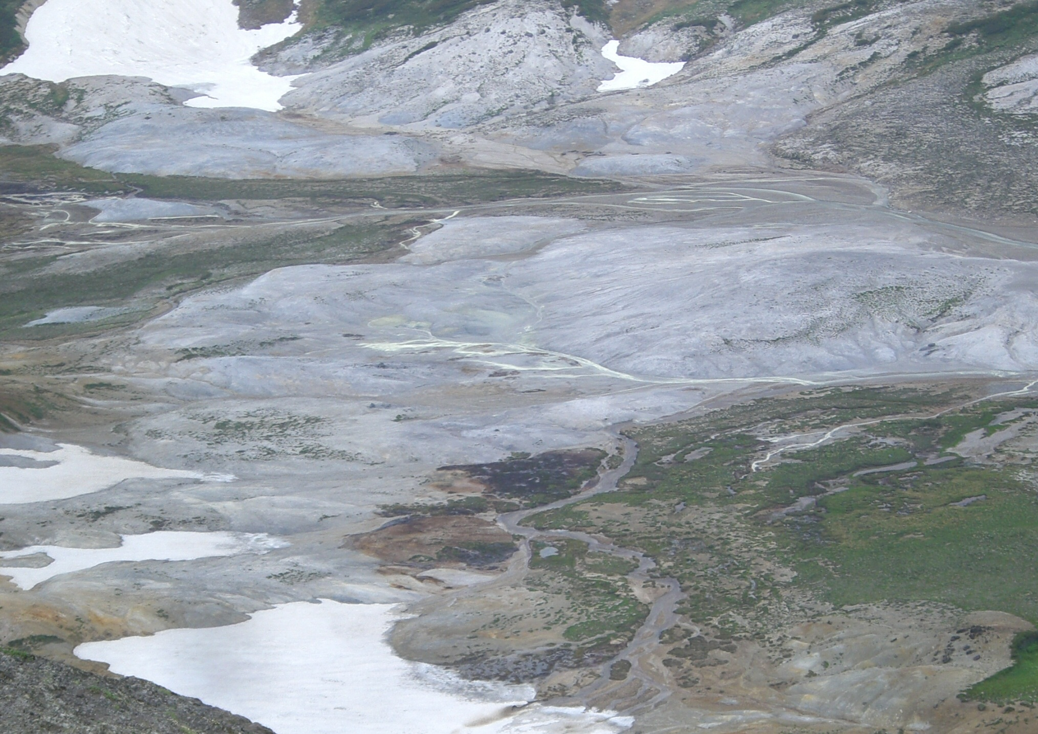 Poisonous-hotspring_Daisets-zan 大雪山の有毒温泉遠景